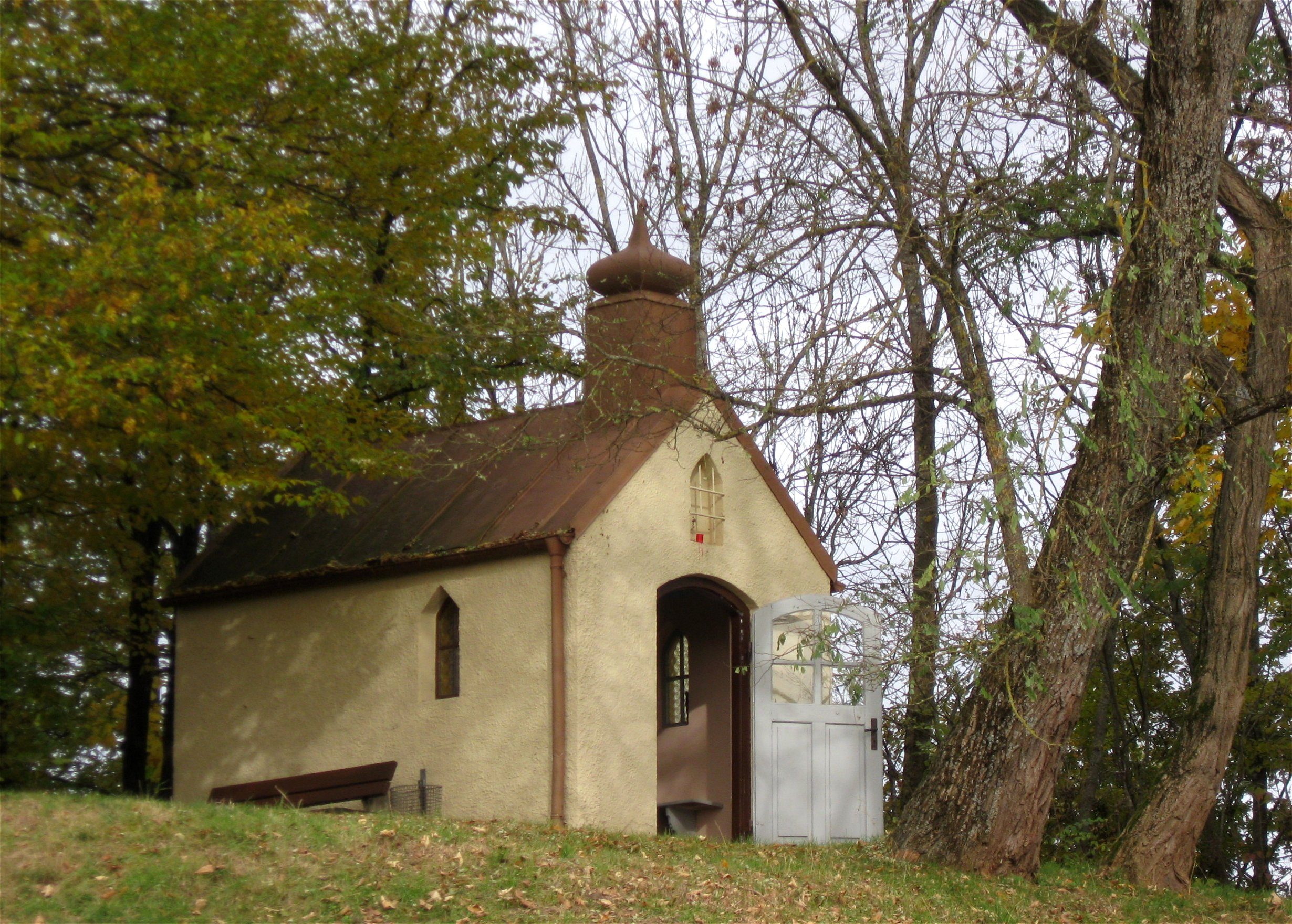 Furth, Further Straße; Wegkapelle, 19./20. Jh.; außerhalb des Ortes